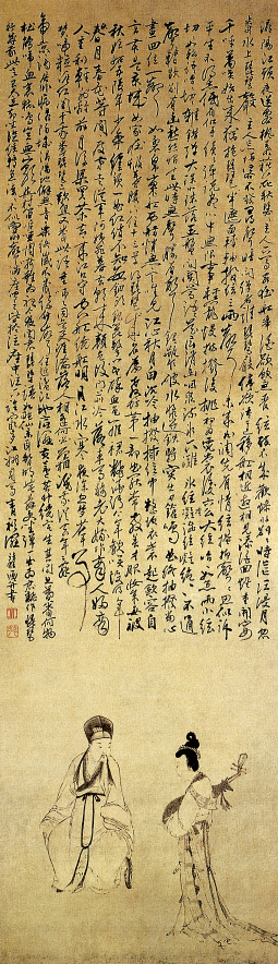 琵琶行圖，明郭诩作